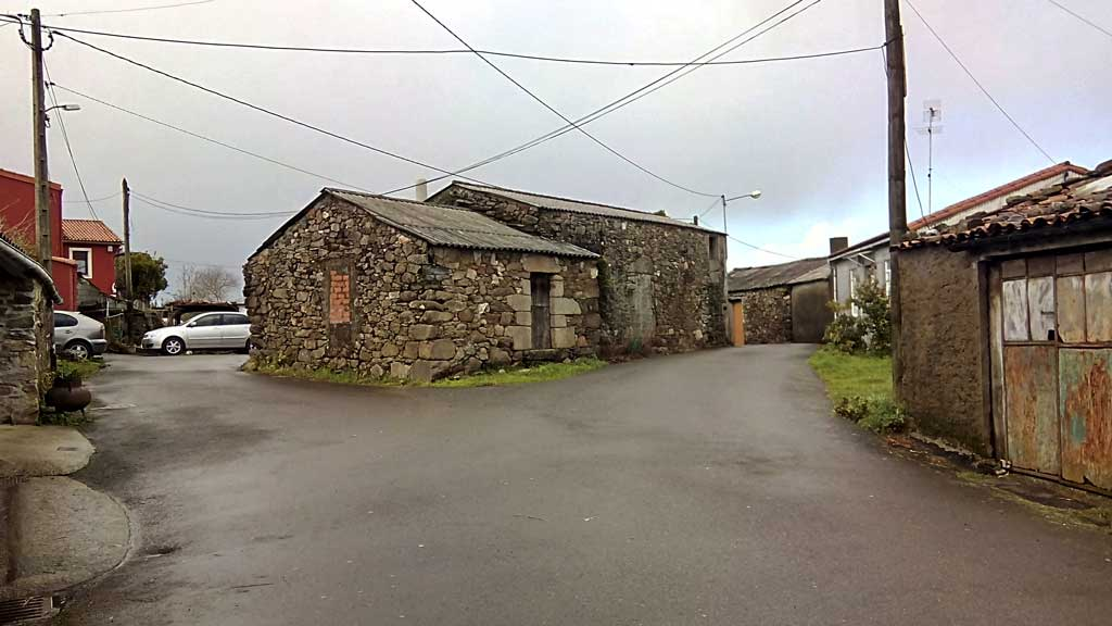 Vista de Seixo de Arriba, Curtis.